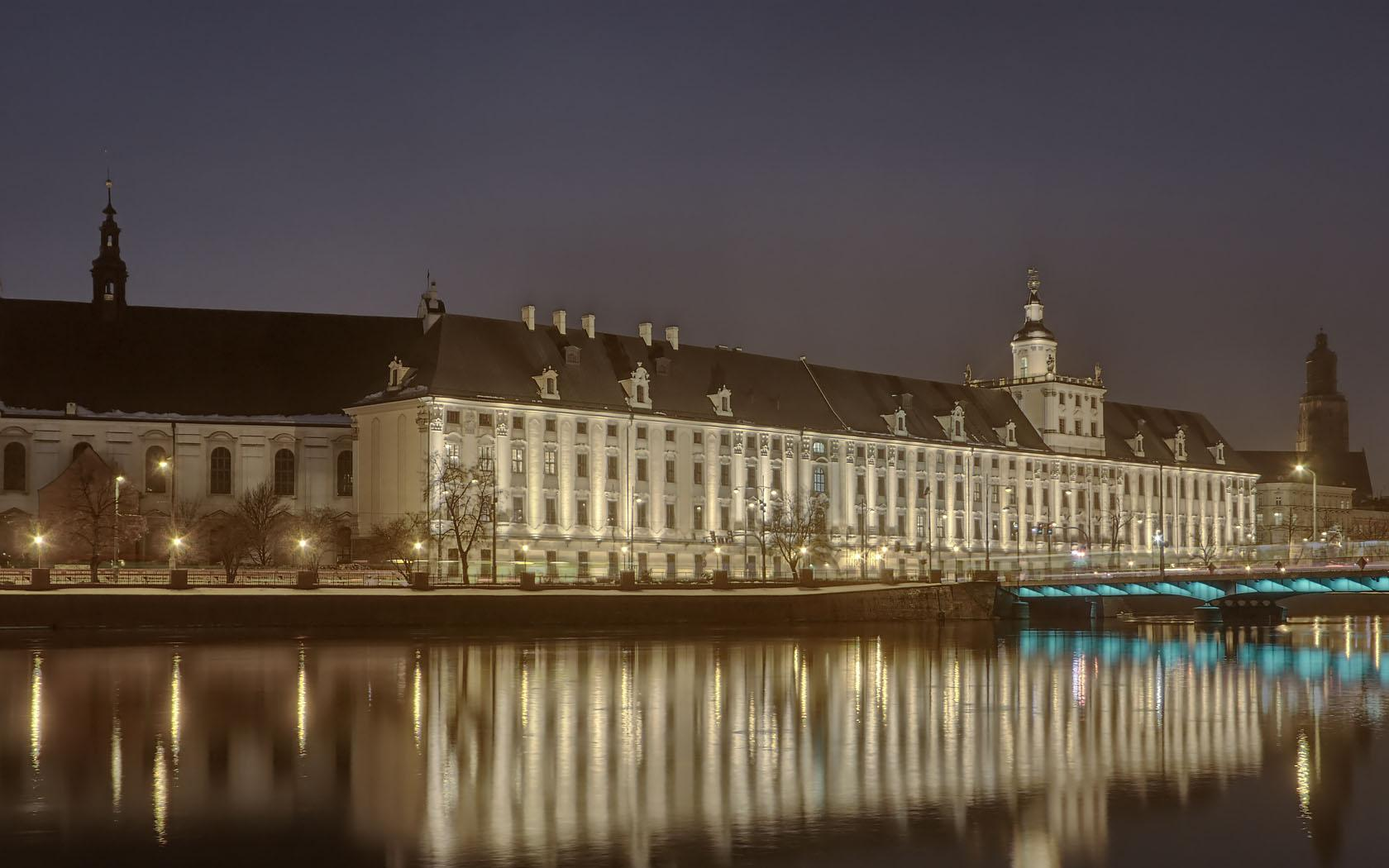 Uniwersytet Wrocławski. Widok od strony Wyspy Słodowej